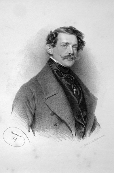 Julius Freiherr von Hügel (1810-1884), kgl. Württembergischer Kammerherr und Vize-Oberstallmeister. Lithographie von Josef Kriehuber, 1849; Literatur: Wolfgang von Wurzbach, Katalog der Porträtlithographien Josef Kriehubers (Walter Krieg Verlag, 2. Auflage, 1955) Nr. 938